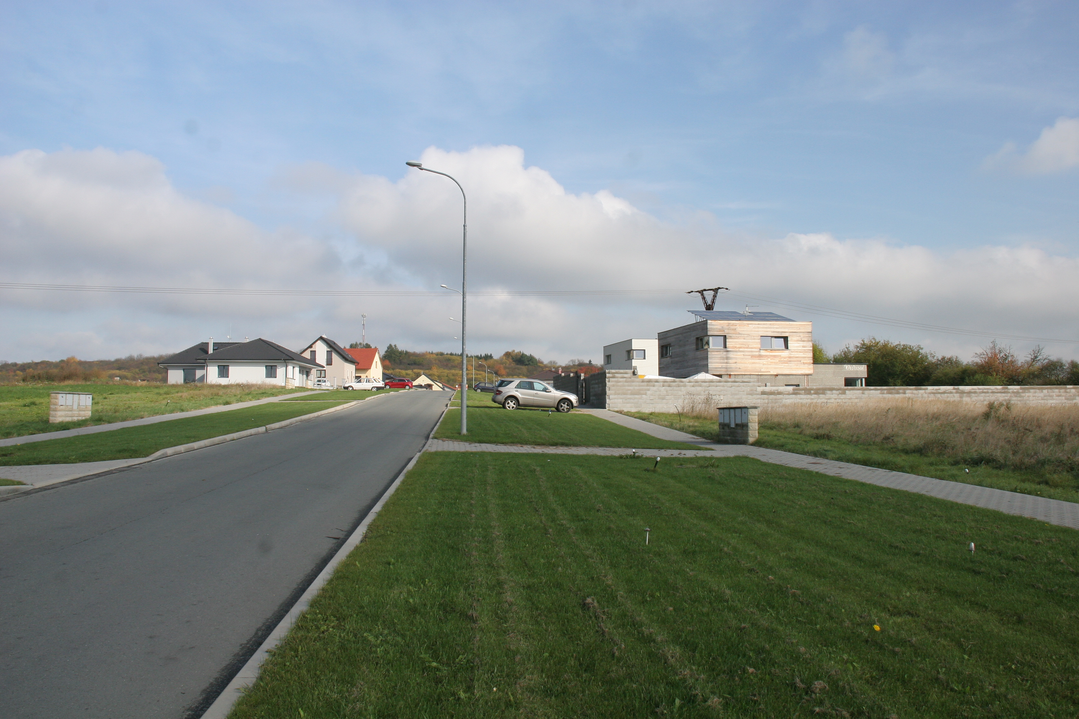 Žiželice novostavby Pod Vinicí